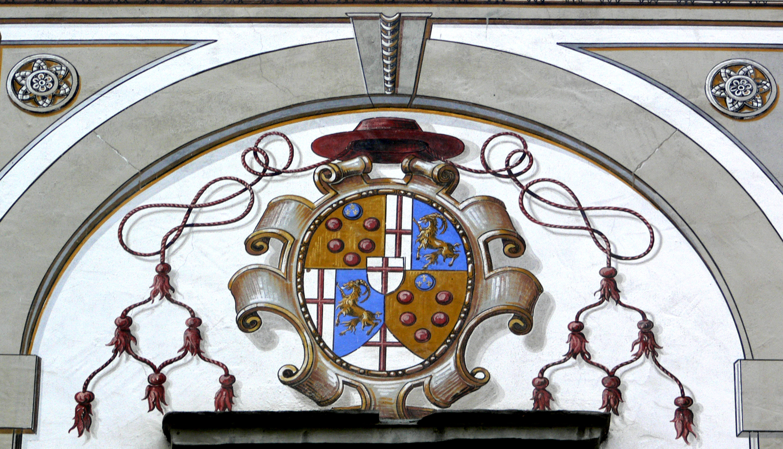 Hohenems, Vorarlberg: Palast Hohenems Wappen Kardinal Markus Sittkus von Hohenems